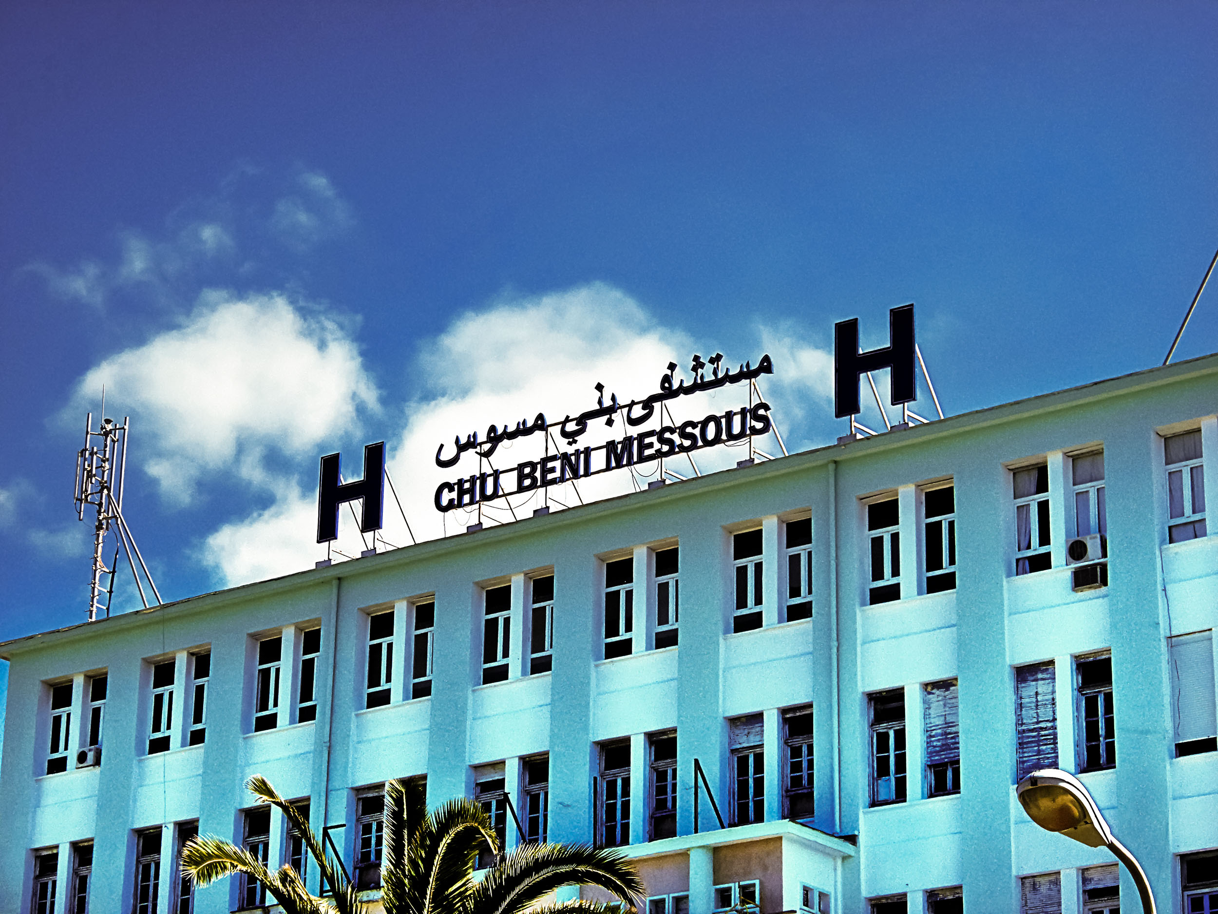 CHU Beni Messous مستشفى بني مسوس